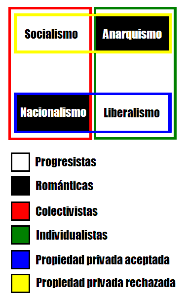 Imagen basada en el artículo de Andrés Ariel Luetich. Clasificación de las ideologías políticas. Actas de la Academia Luventicus 2002 (1): 1-10. Rosario, 2002. ISSN 1666-7581.